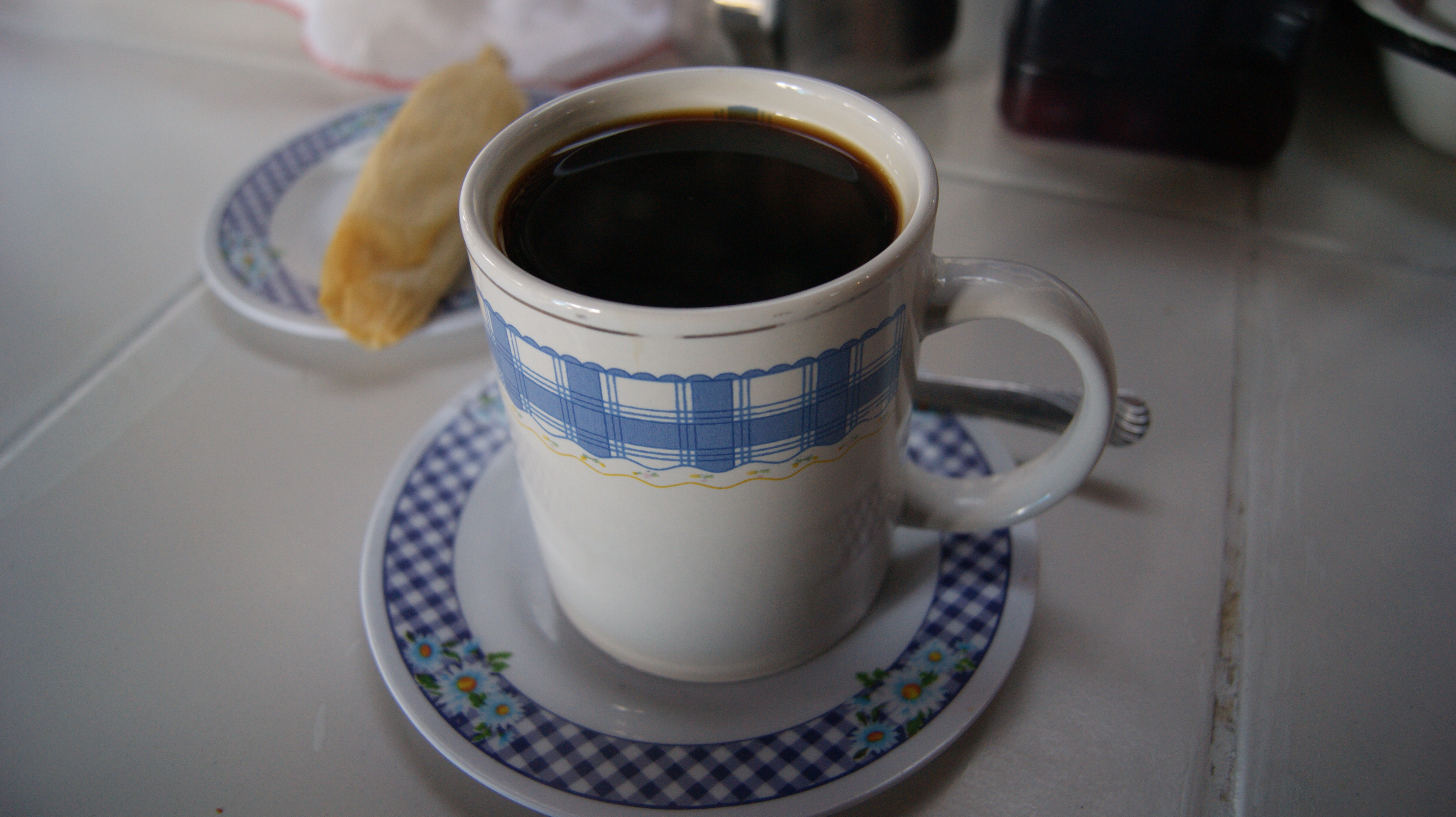 Taza de café pasado servida en el Mercado de Cusco.